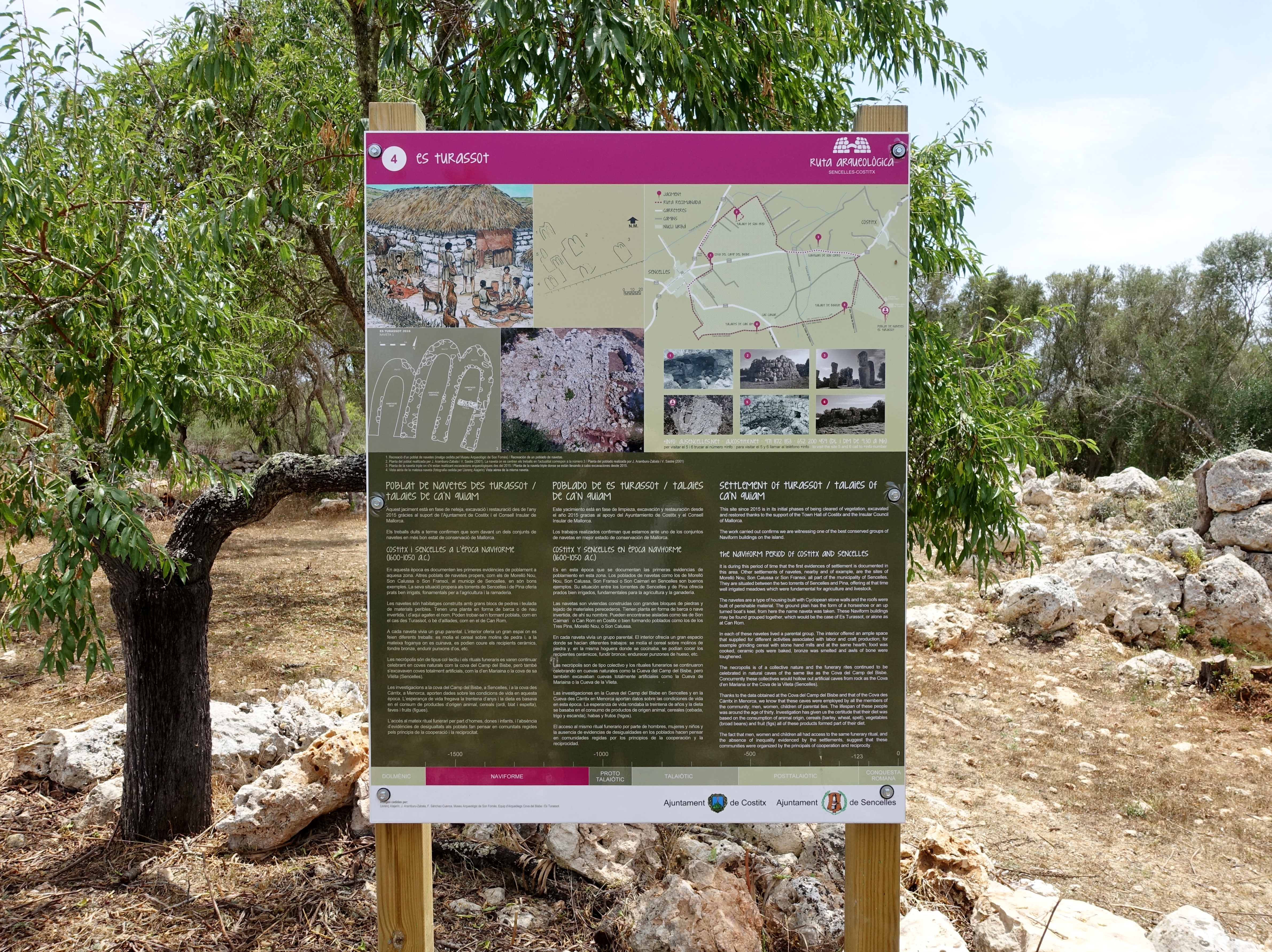 Hinweisschild an der Naveta-Siedlung von Turassot, Gemeinde Costitx, Mallorca, Spanien